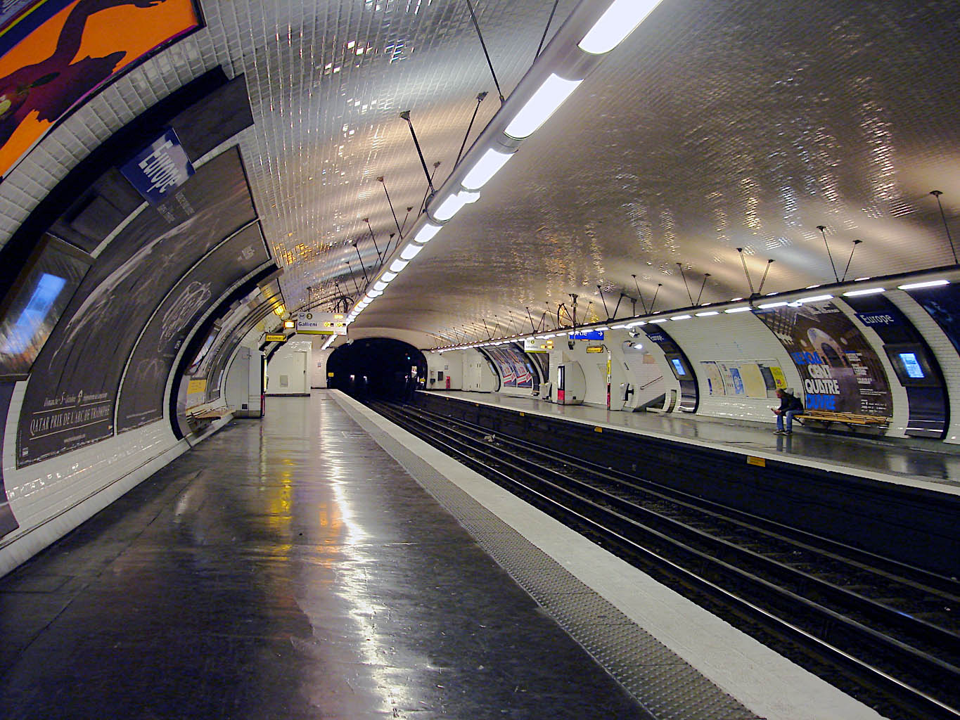 Station Europe de la ligne 3 du métro de Paris, France.